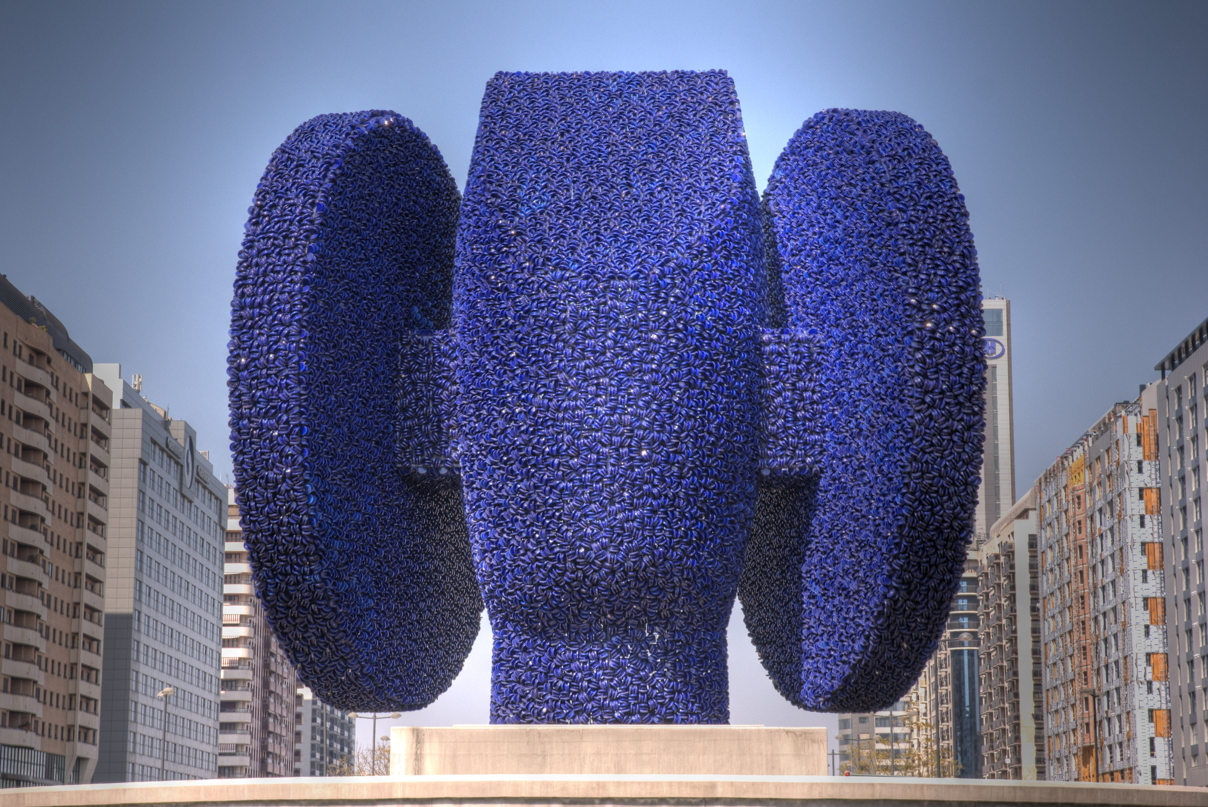 Dama de Elche ubicada en una rotonda de la Avenida de las Cortes Valencianas en Valencia. La escultura la forman centenares de figuras en miniatura de la misma figura.